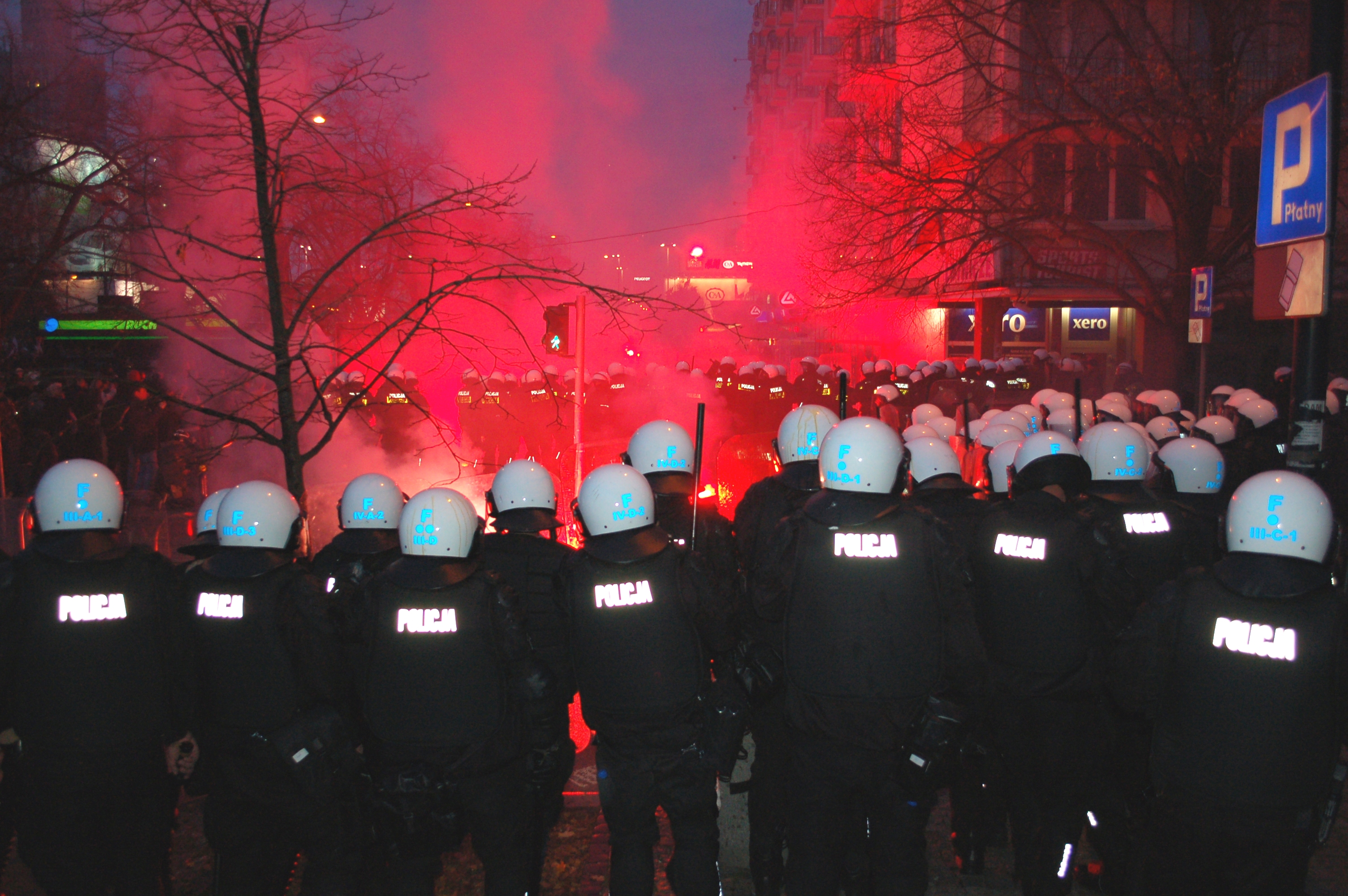 Independence March Warsaw 11.11.2012